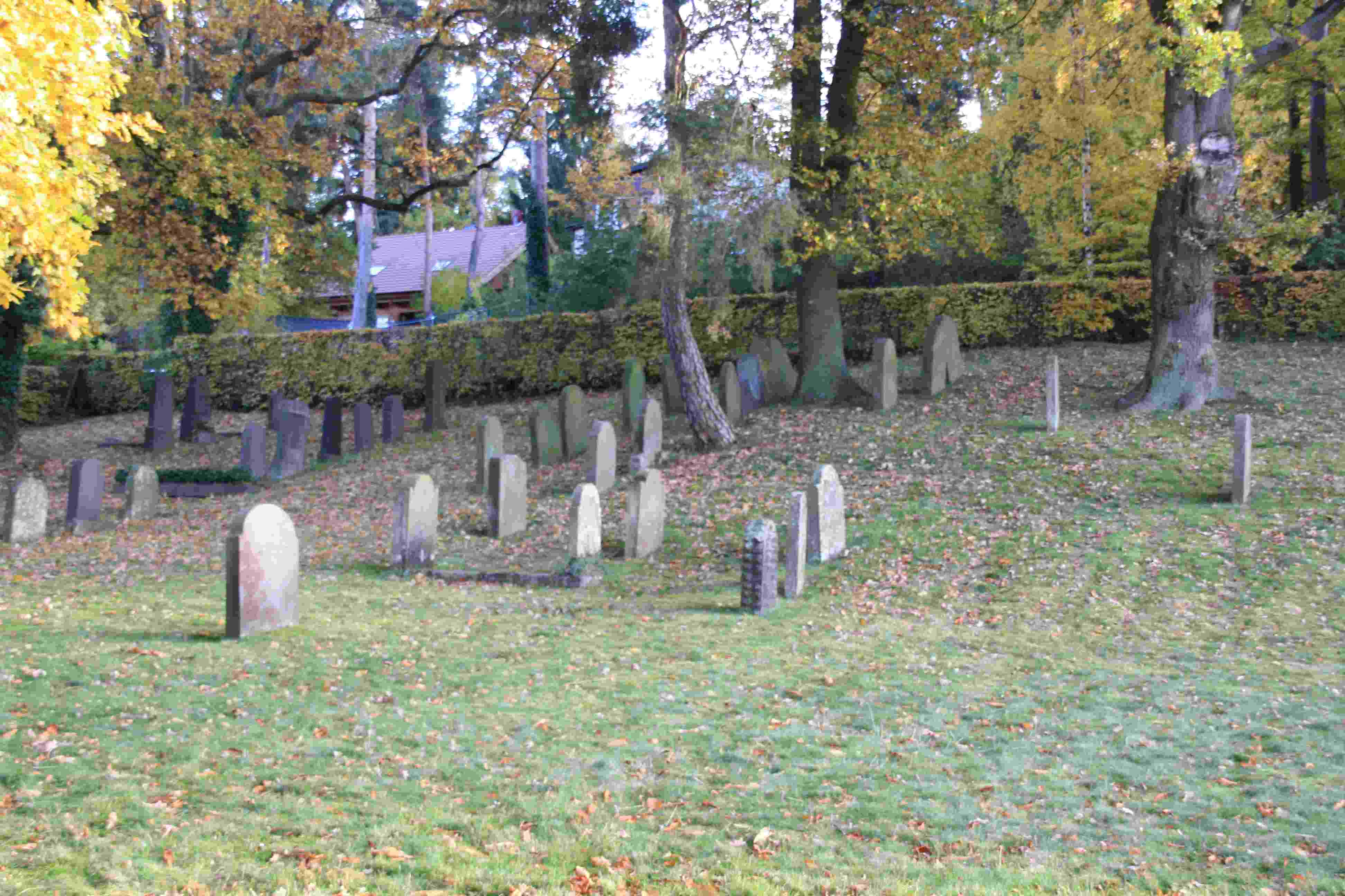 Jüdischer Friedhof Kommern 02